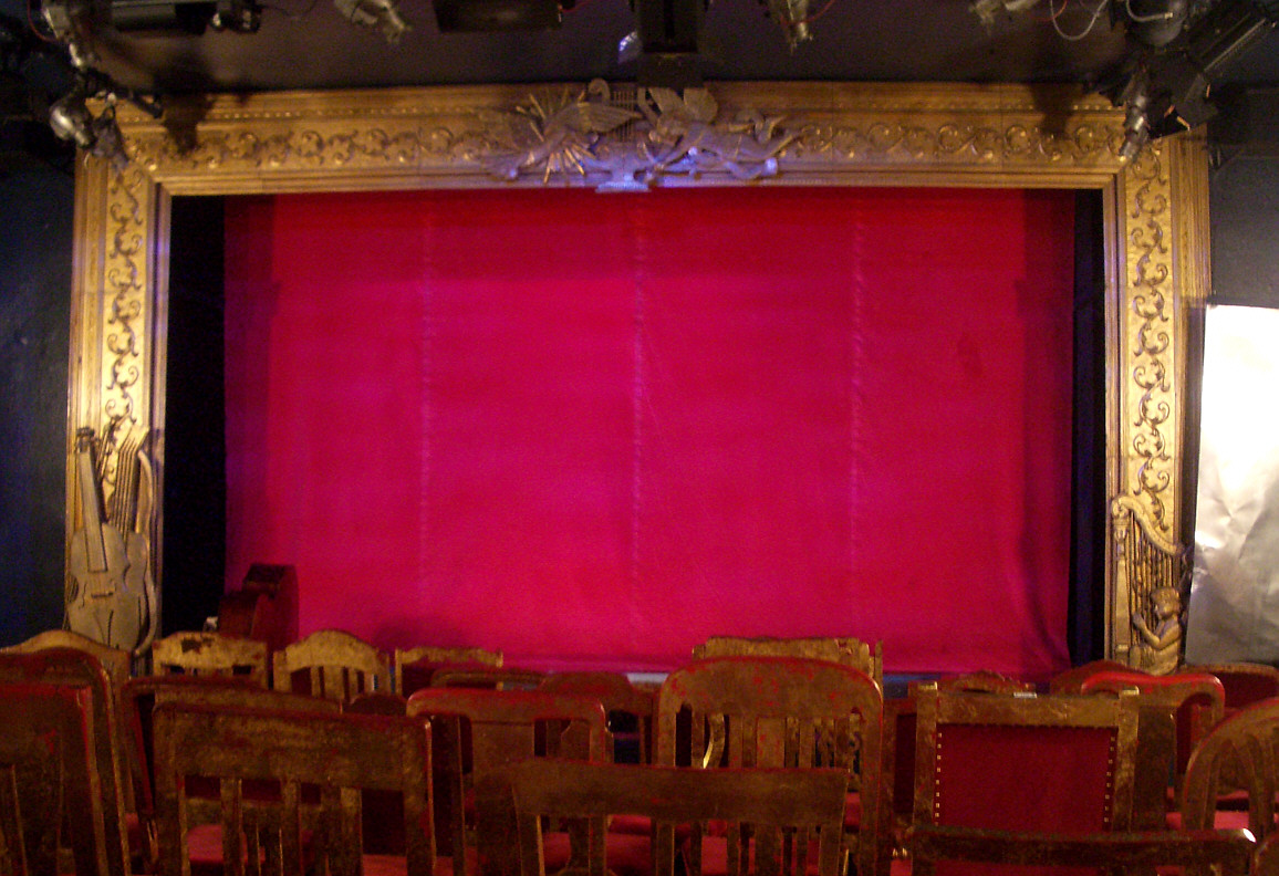 Hamburg, Germany: Alleetheater (Hamburger Kammeroper) / Theater für Kinder, Max-Brauer-Allee, Altona